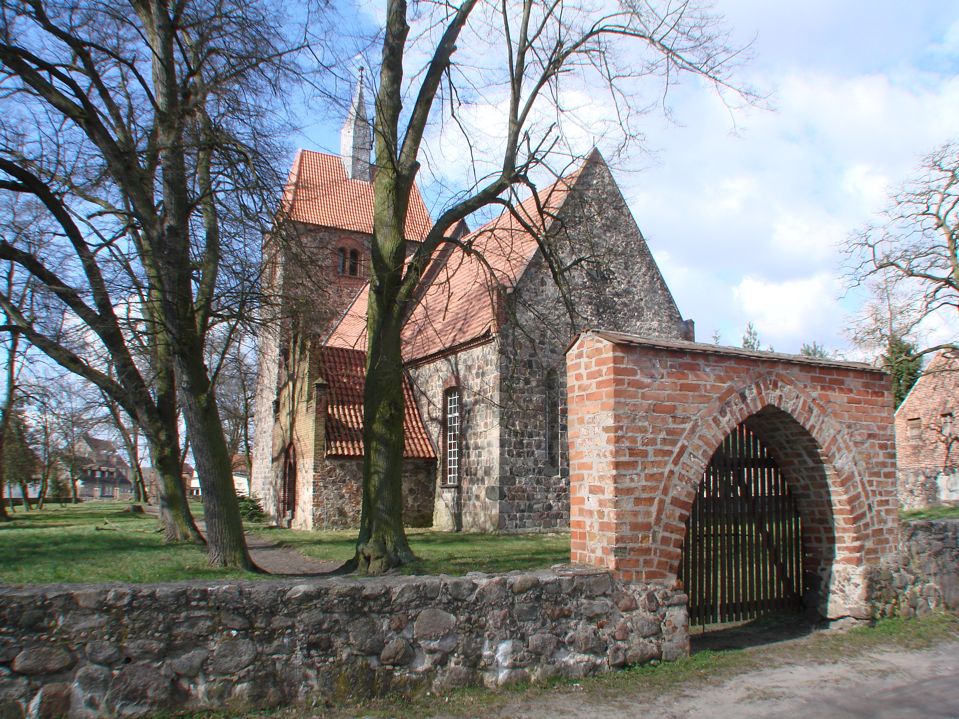 Arensdorf alte Wehrkirche